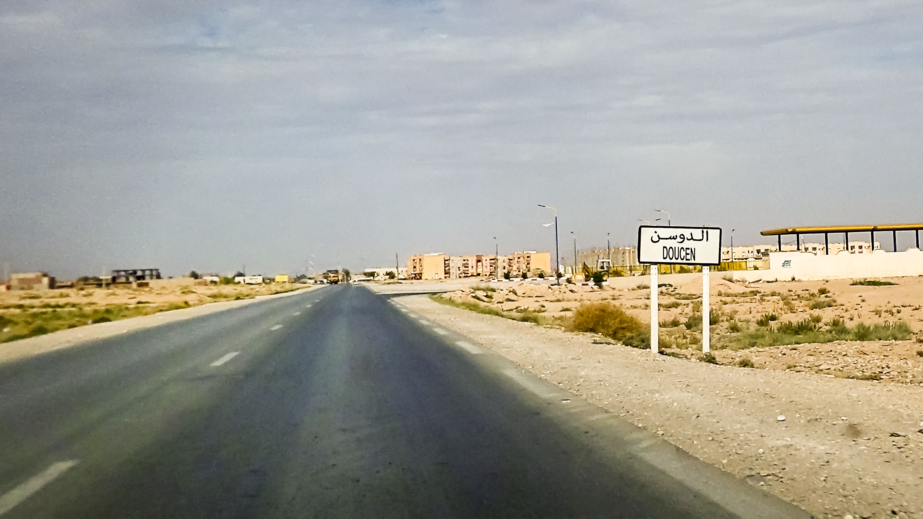 Doucen, wilaya de Biskra الدوسن، ولاية بسكرة